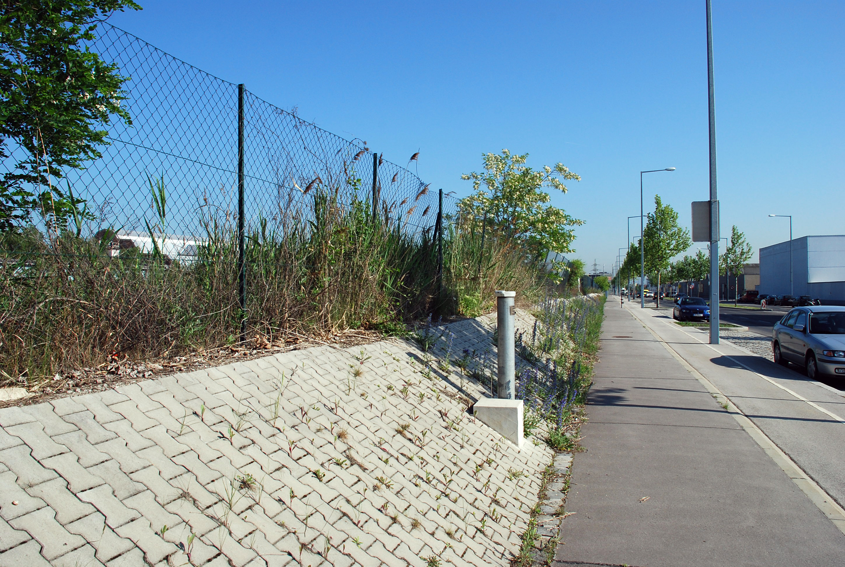 Reste des Chemiewerkes von Wagenmann, Seybel & Cie in Wien, Liesing: Böschung der angeschütteten Produktionsreste an der Brunner Straße Wien 23.